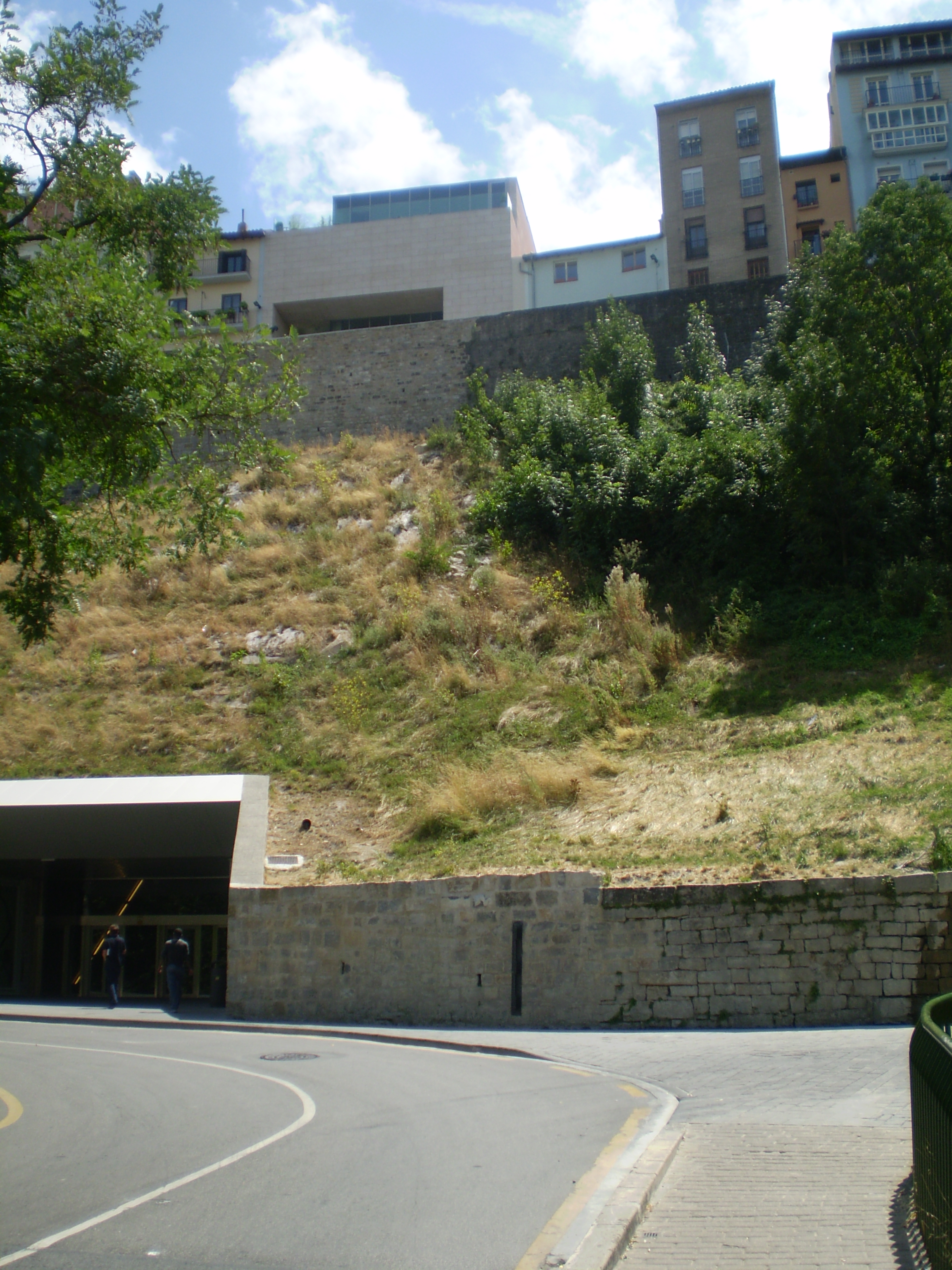 Ascensor de que comunica el barrio pamplones de la Rochapea con el Casco Antiguo. Vista desde abajo desde el puente de Curtidores